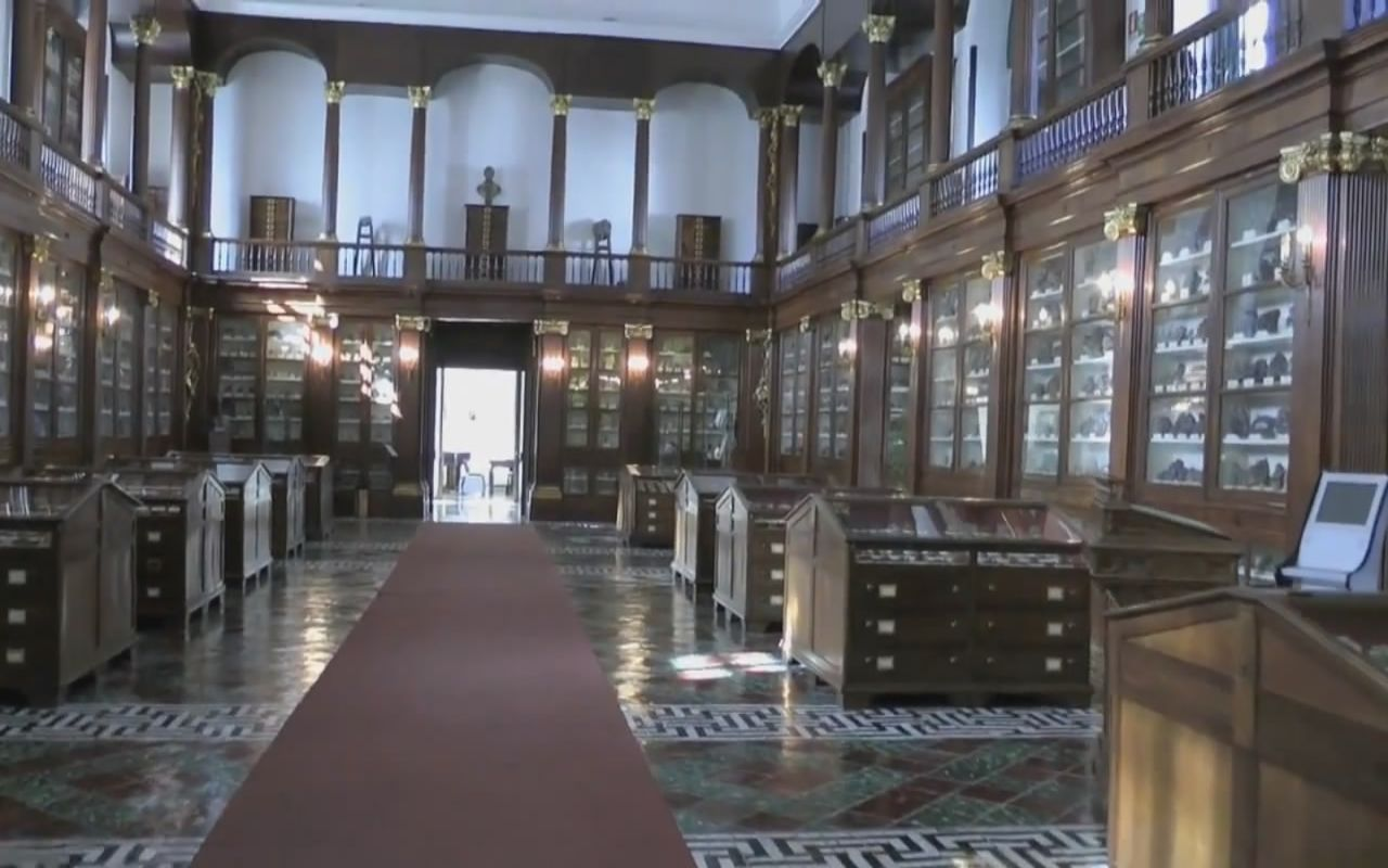 Museo di Mineralogia di Napoli